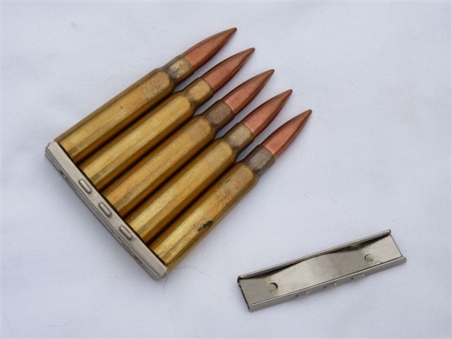 7.92×57mm毛瑟